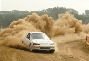 Honda Civic DOHC VTEC 1600CC Clase A6 de competición en una Carrera de Rally en formato de Super Prime realizado en el Autodromo Aratiri en Paraguay.